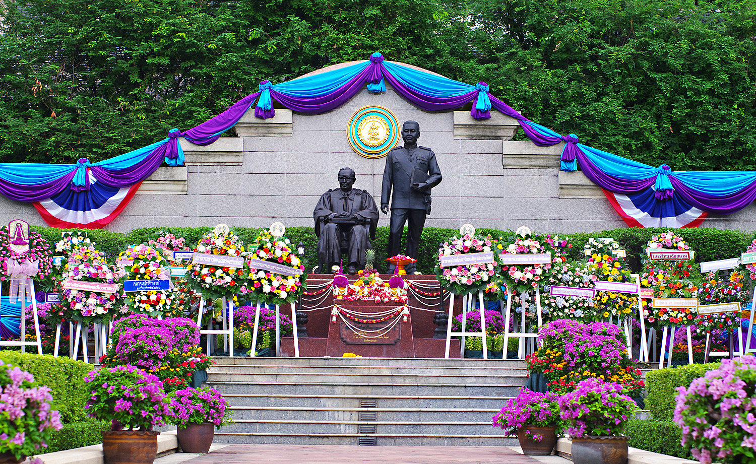 อนุสาวรีย์ผู้ก่อตั้งมหาวิทยาลัย(ดร.ไสว สุทธิพิทักษ์และอาจารย์สนั่น เกตุทัต)